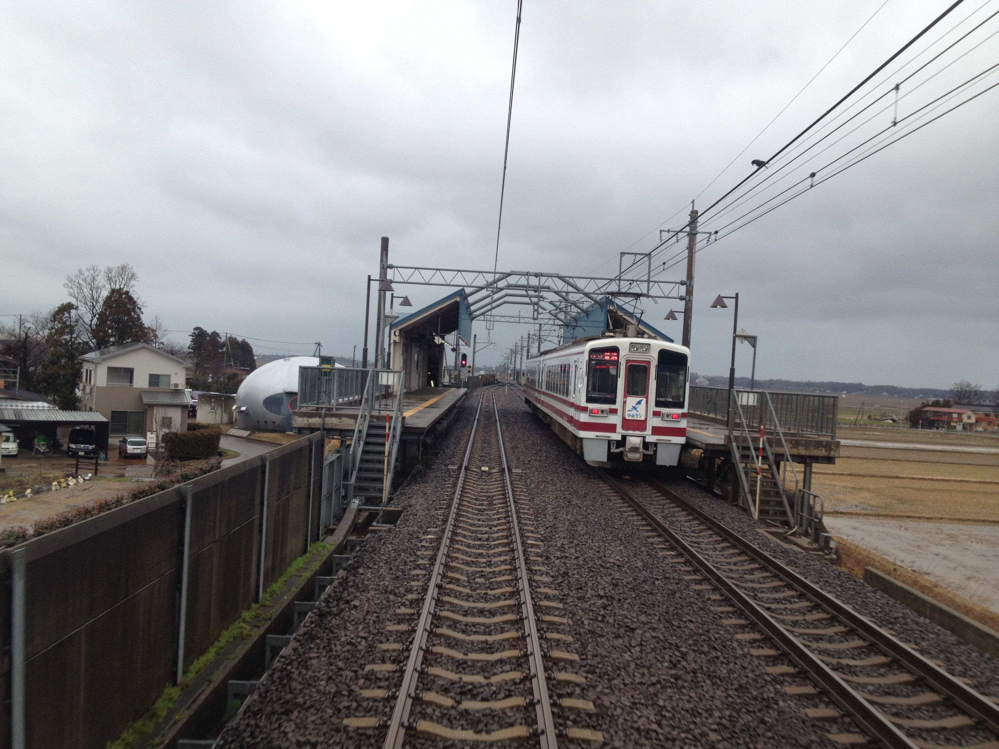 くびき駅構内